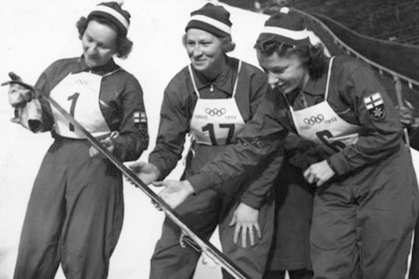 Sirkka Polkunen, Siiri Rantanen and Lydia Wideman at the 1952 Olympics